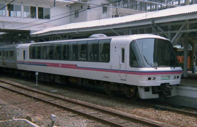 JR西日本クロ212形電車。Koneが撮影。